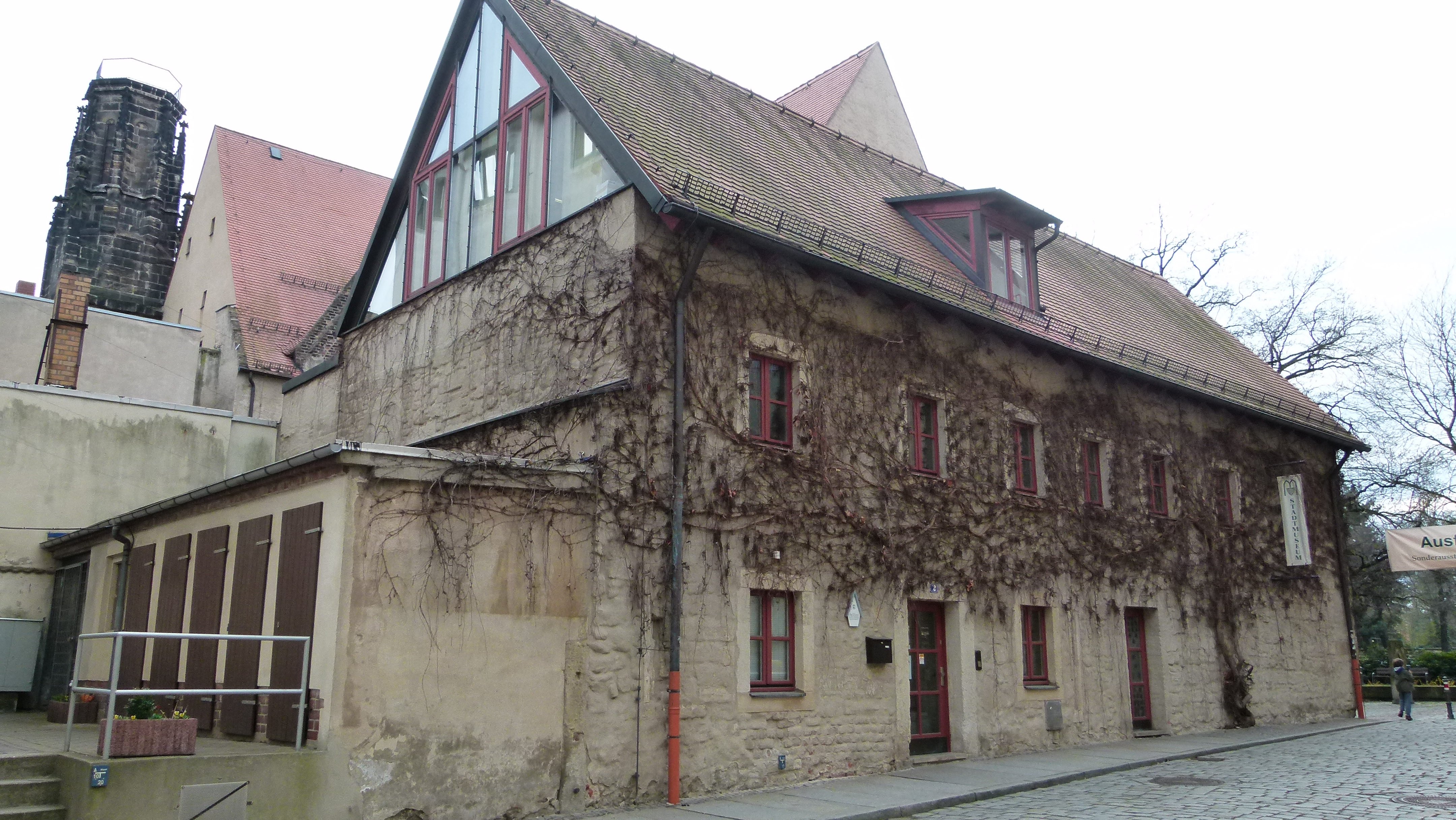 Denkmalgeschütztes Haus, Klosterhof 2, Pirna, Sachsen